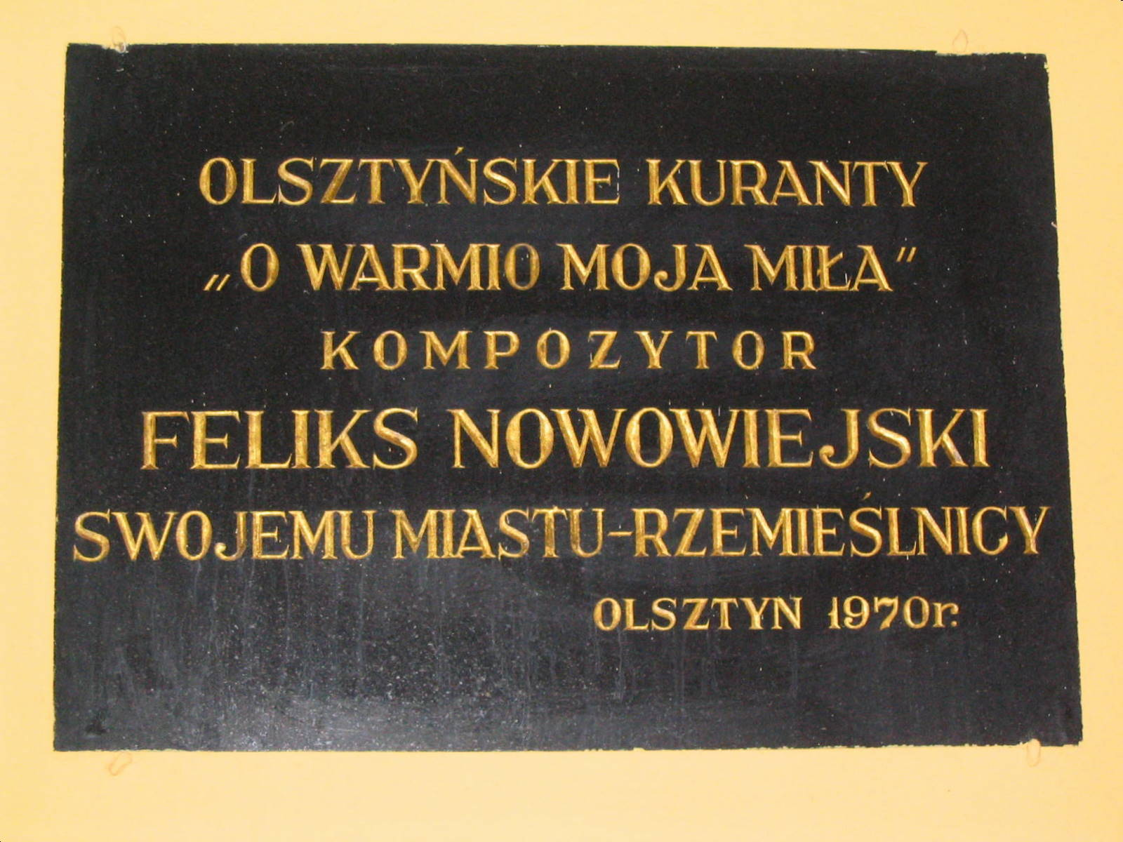 Tablica pamiątkowa "O Warmio moja miła" w holu Nowego Ratusza w Olsztynie